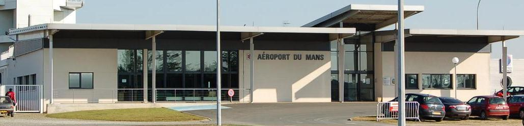 Photographie prise de la façade des bâtiments de l'aéroport du Mans.